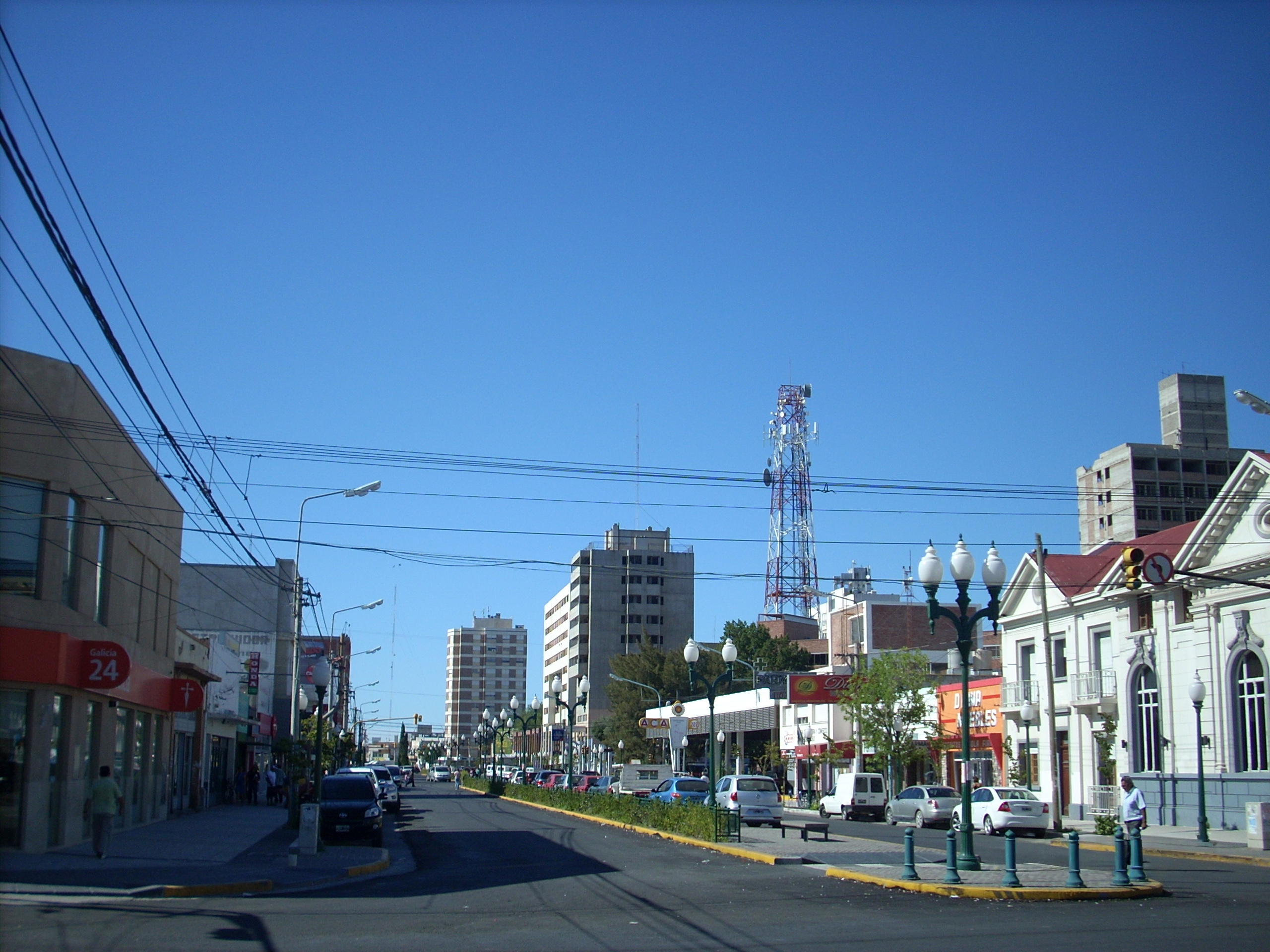 Avenida Gobernador Fontana